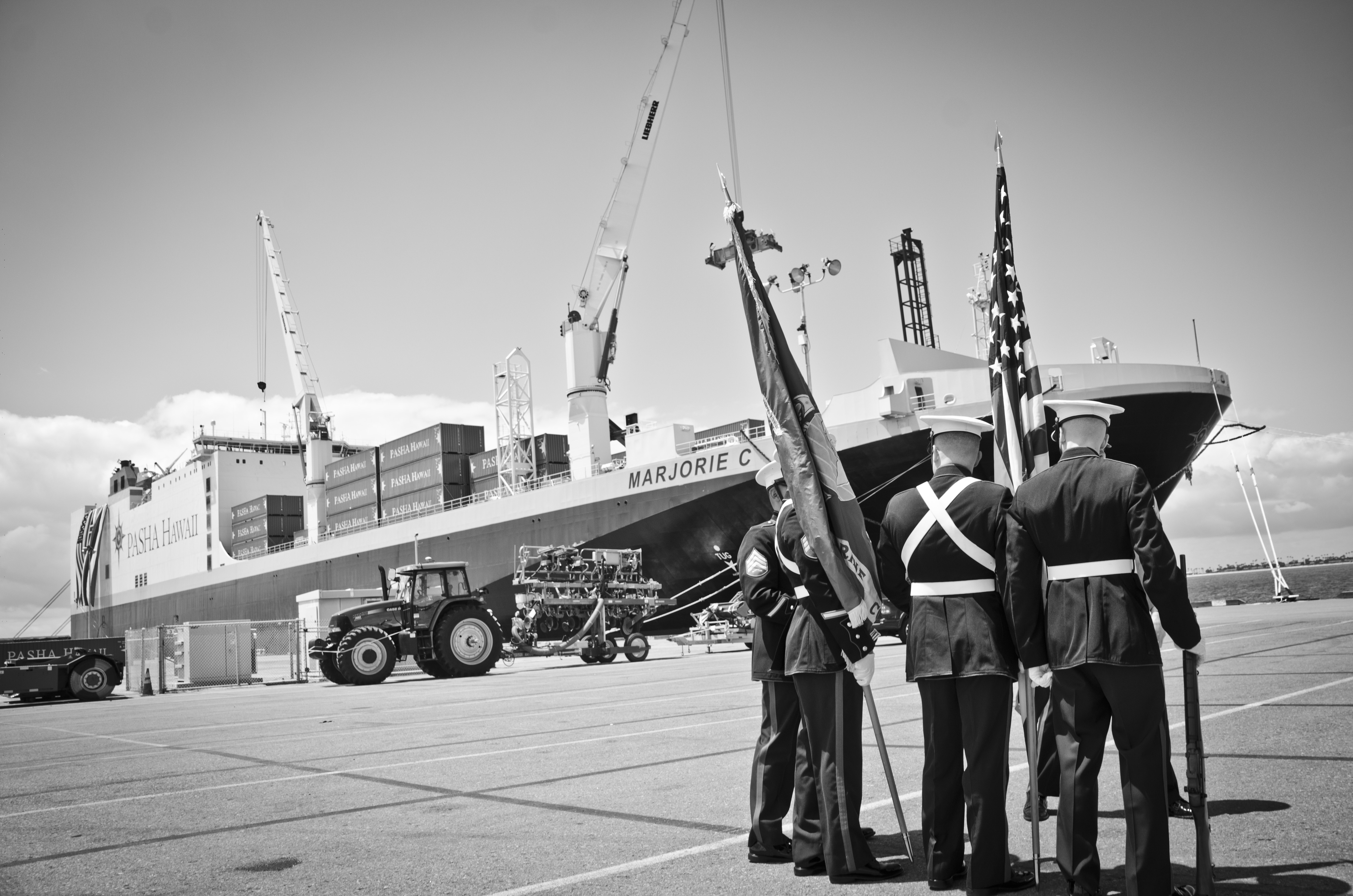 marjorie_4